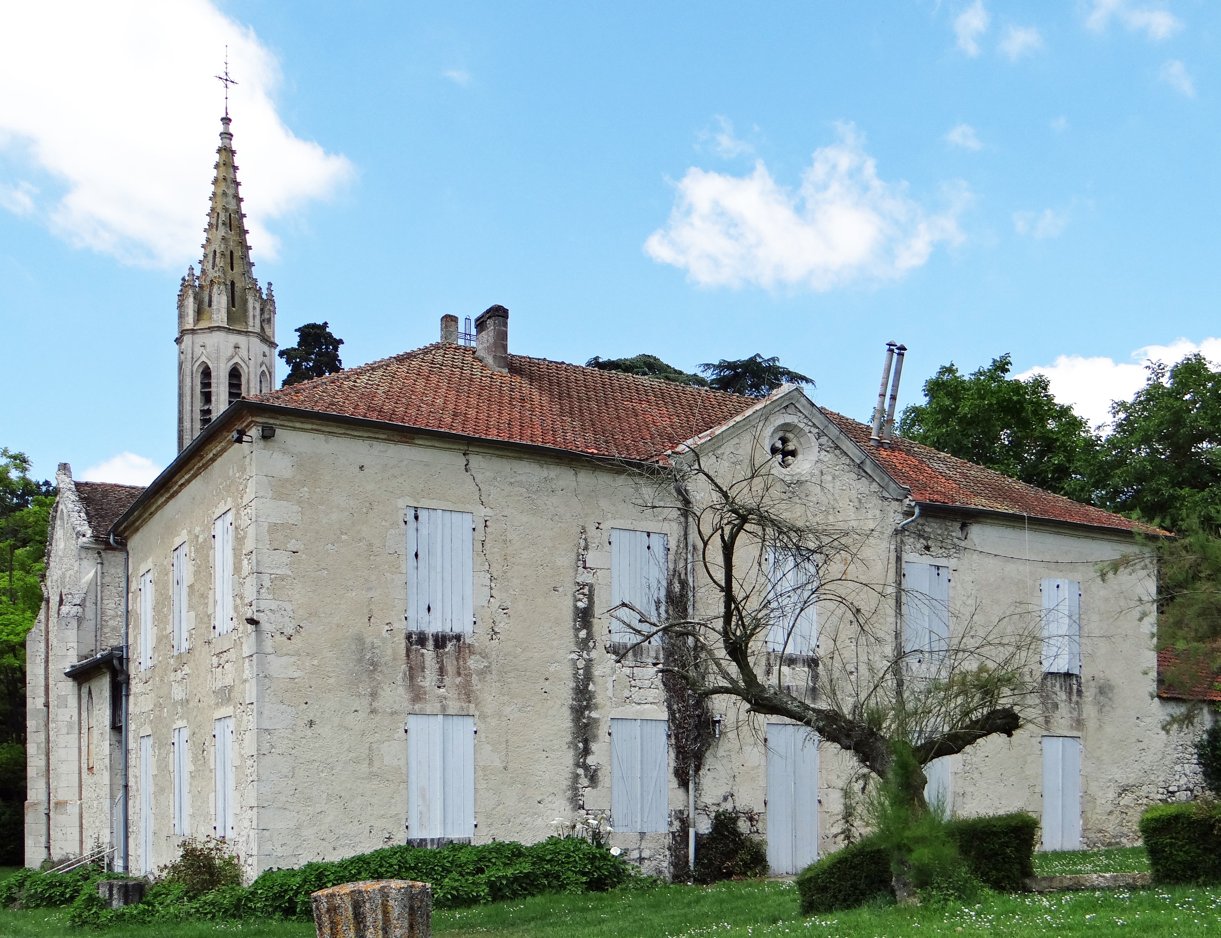 Saint-Mézard - Chapelle Notre-Dame-d'Esclaux